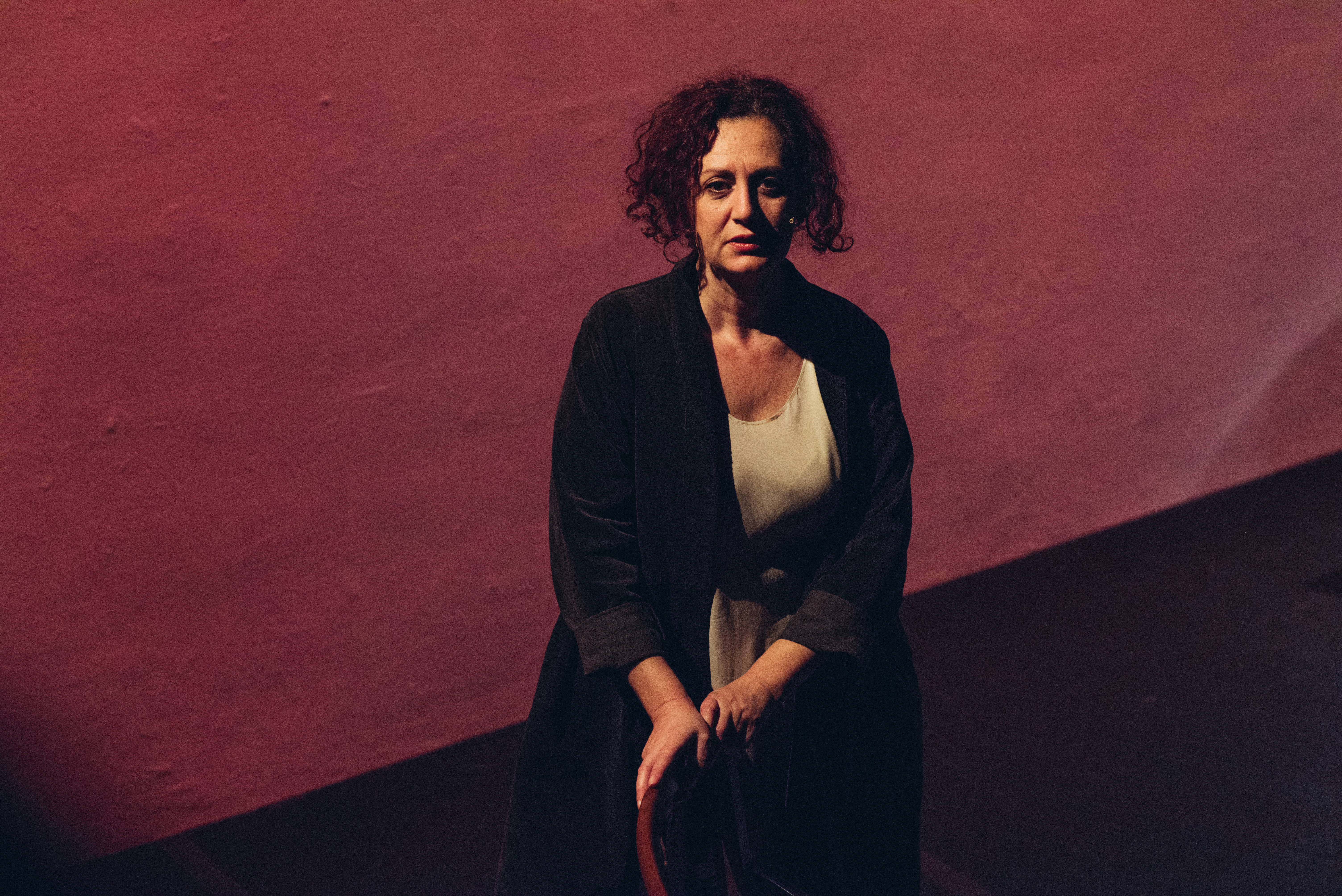 Egidia Bruno